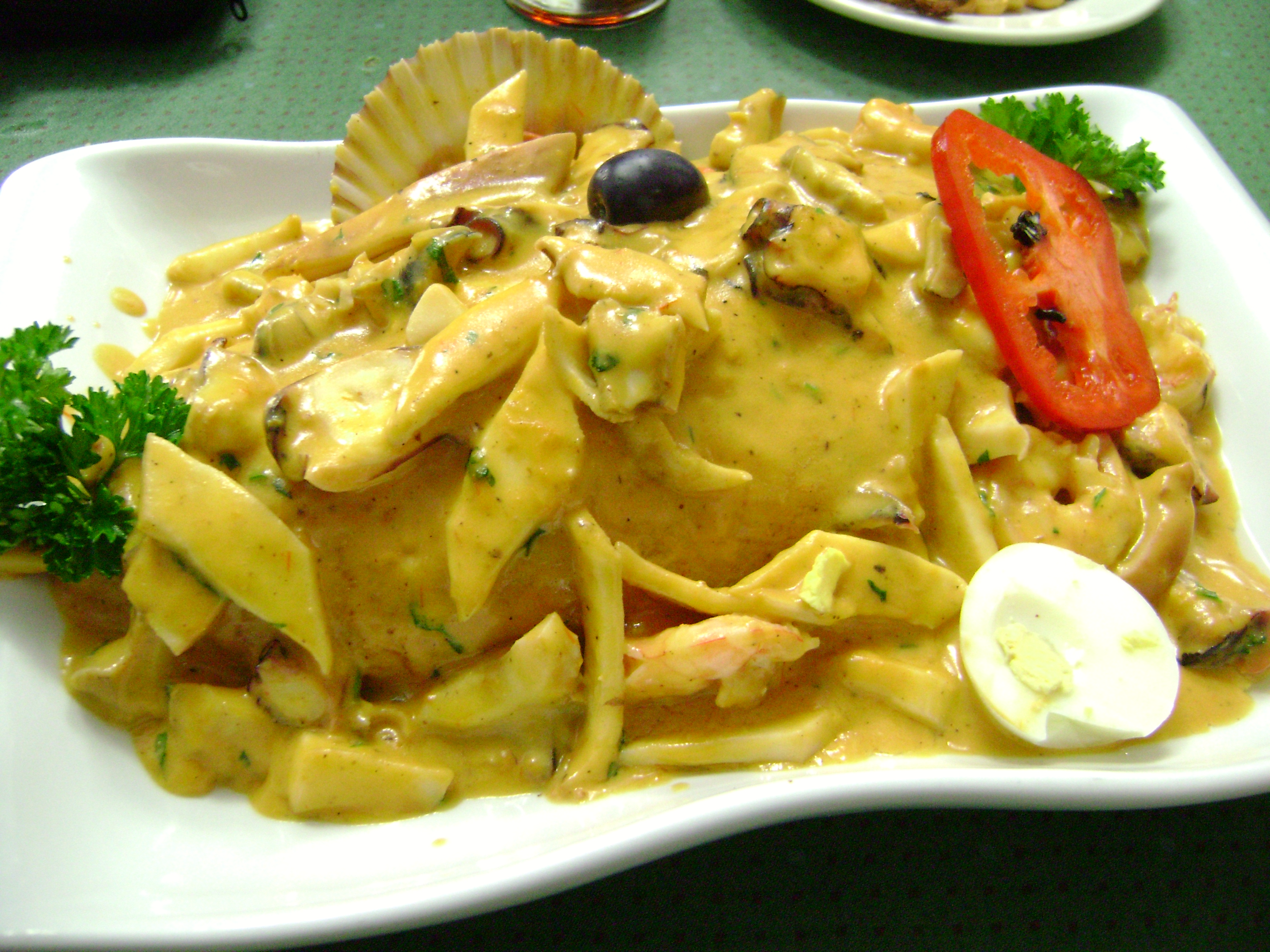 Tacu-tacu bañado en salsa de mariscos. Lima, Perú.